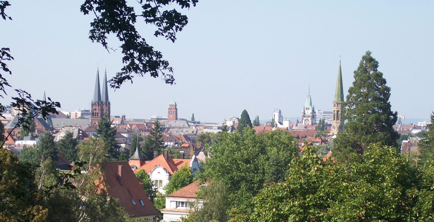 Blick auf die Wiehre vom Bromberg